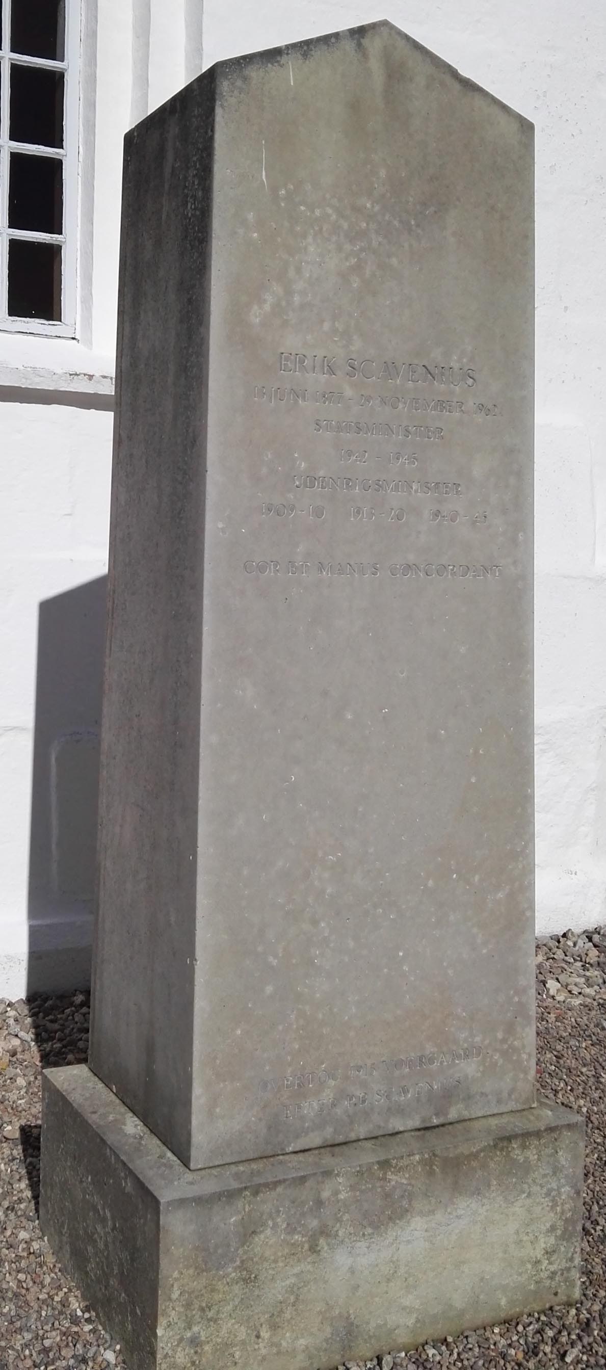 Gravsten over Erik Scavenius på Voer Kirkegård